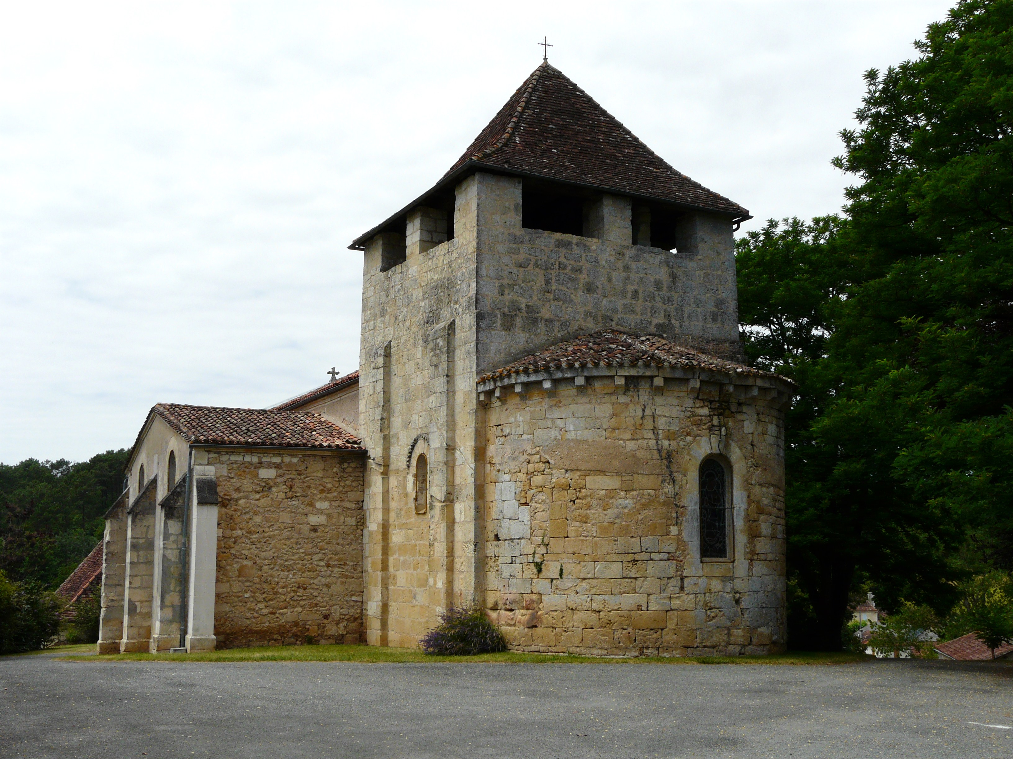 L'église Saint-Jean Baptiste, Saint-Jean-d'Eyraud, Dordogne, France Object location44° 57′ 16.2″ N, 0° 27′ 09.1″ E